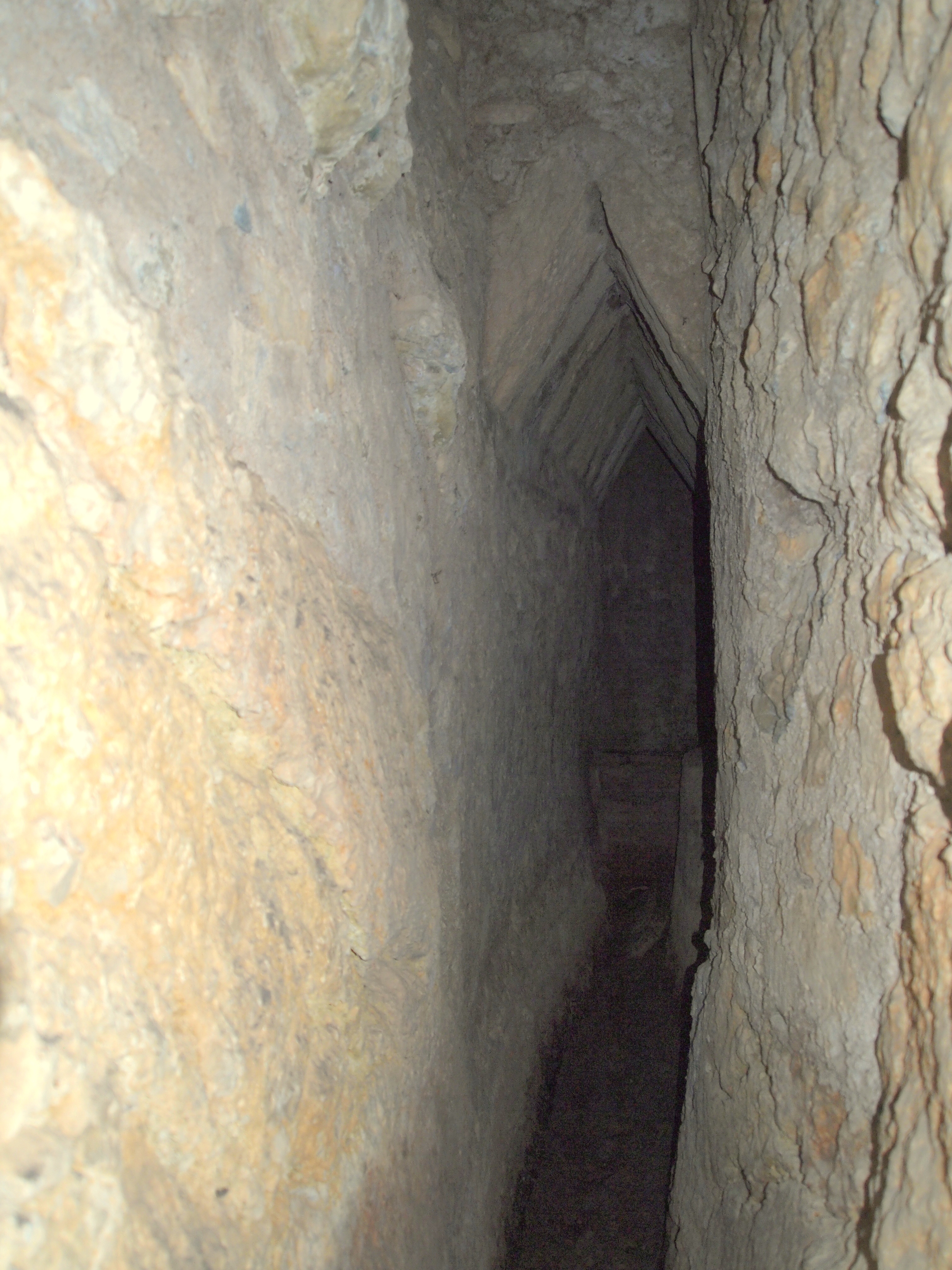 Inici de la galeria del qanat de son Reus a Mallorca